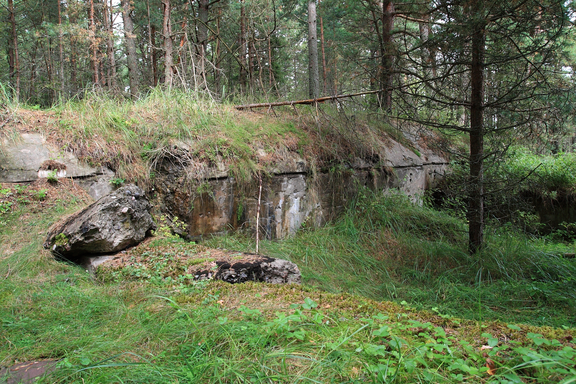 Naissaar, rannapatarei nr 5 (EV nr. 4)